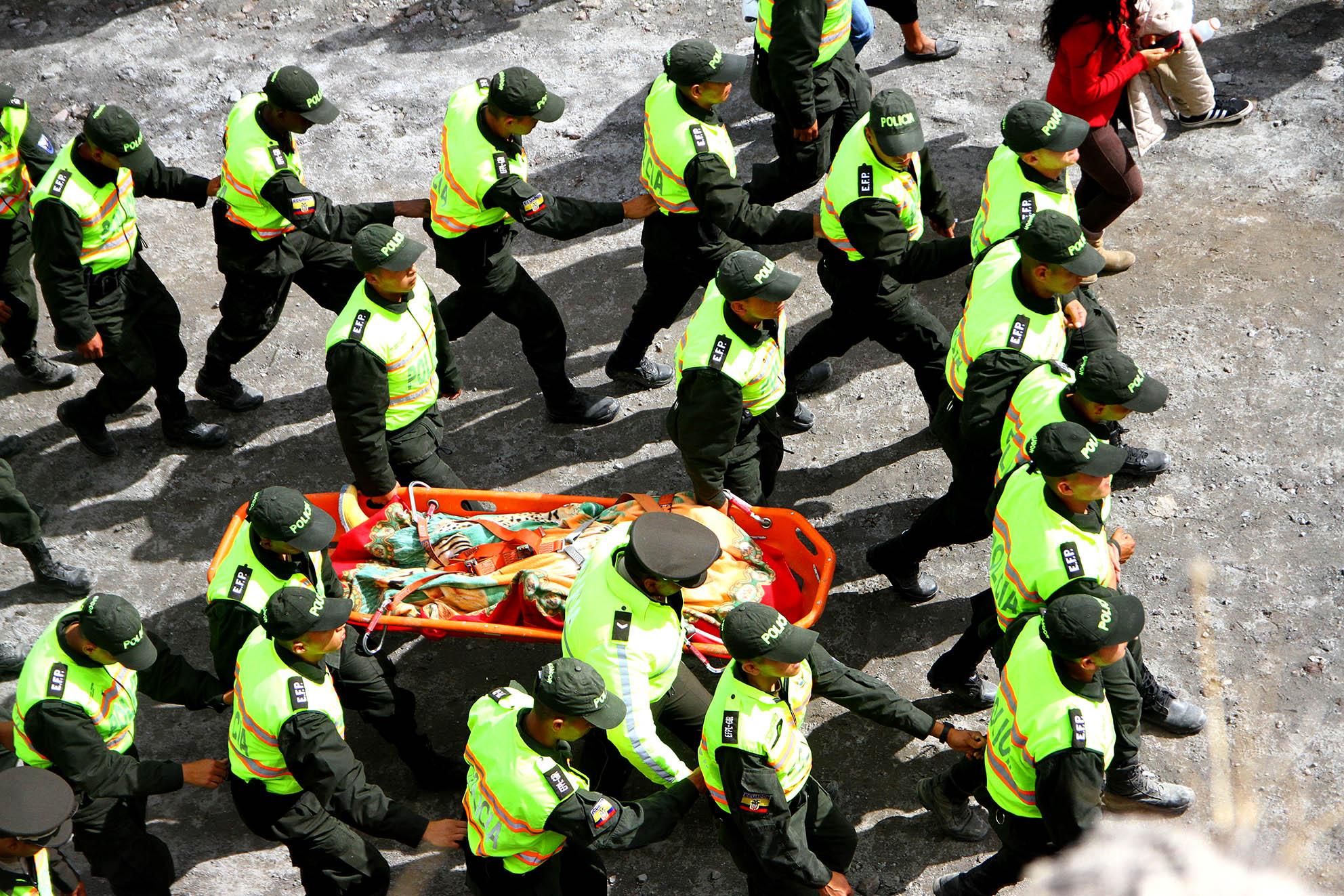 RESCATE DE LA VICTIMA DEL DERRUMBE EN EL CATEQUILLA